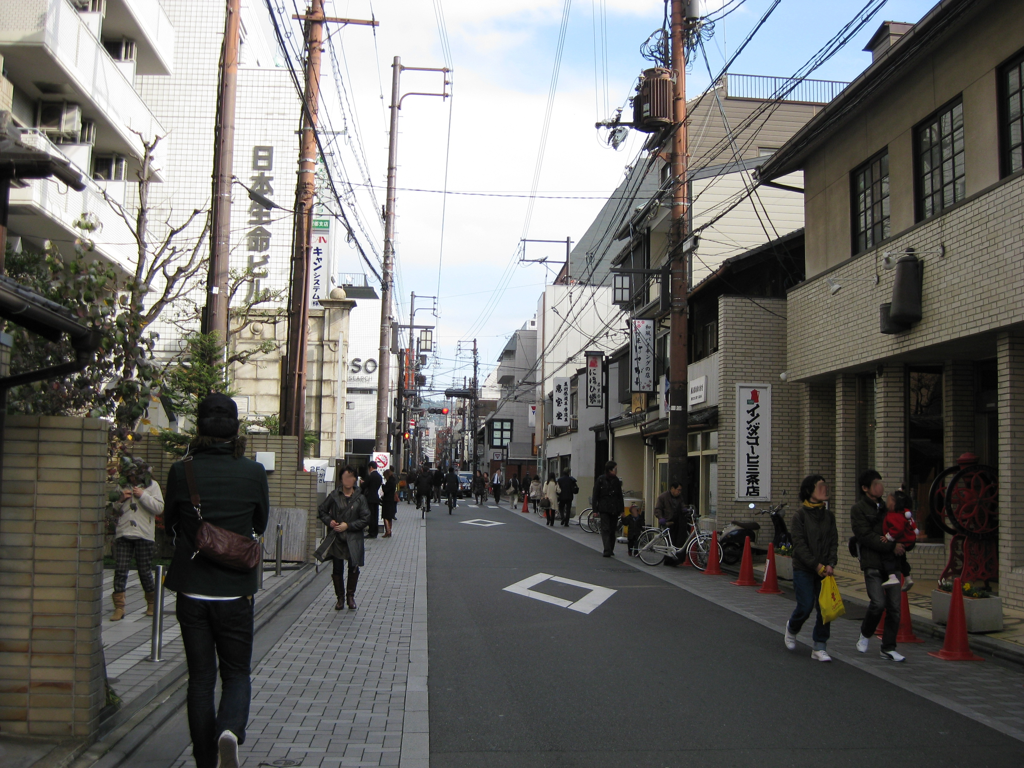 三条通。堺町通との交差点付近から東方向